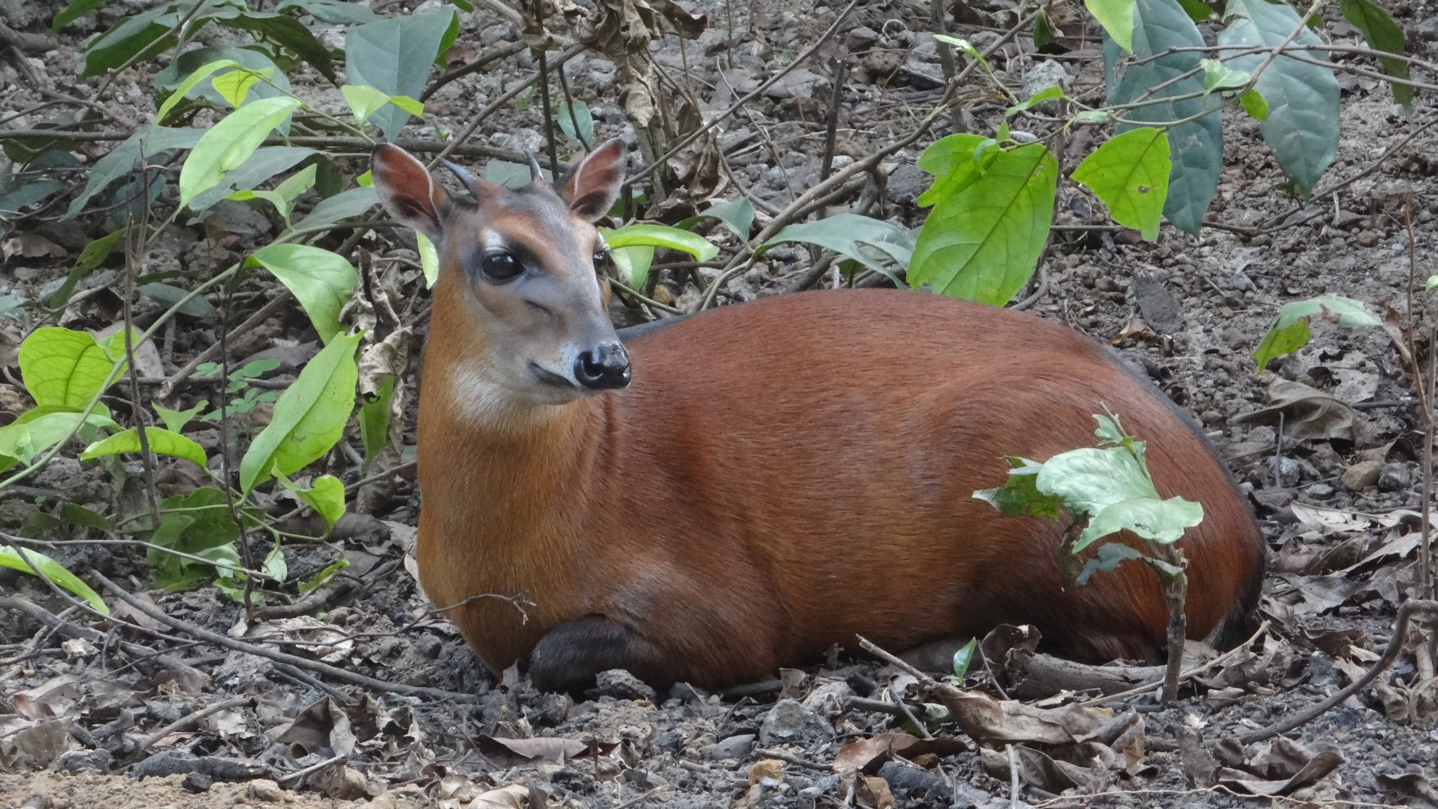 Cephalophus dorsalis ou céphalophe à bande dorsale.